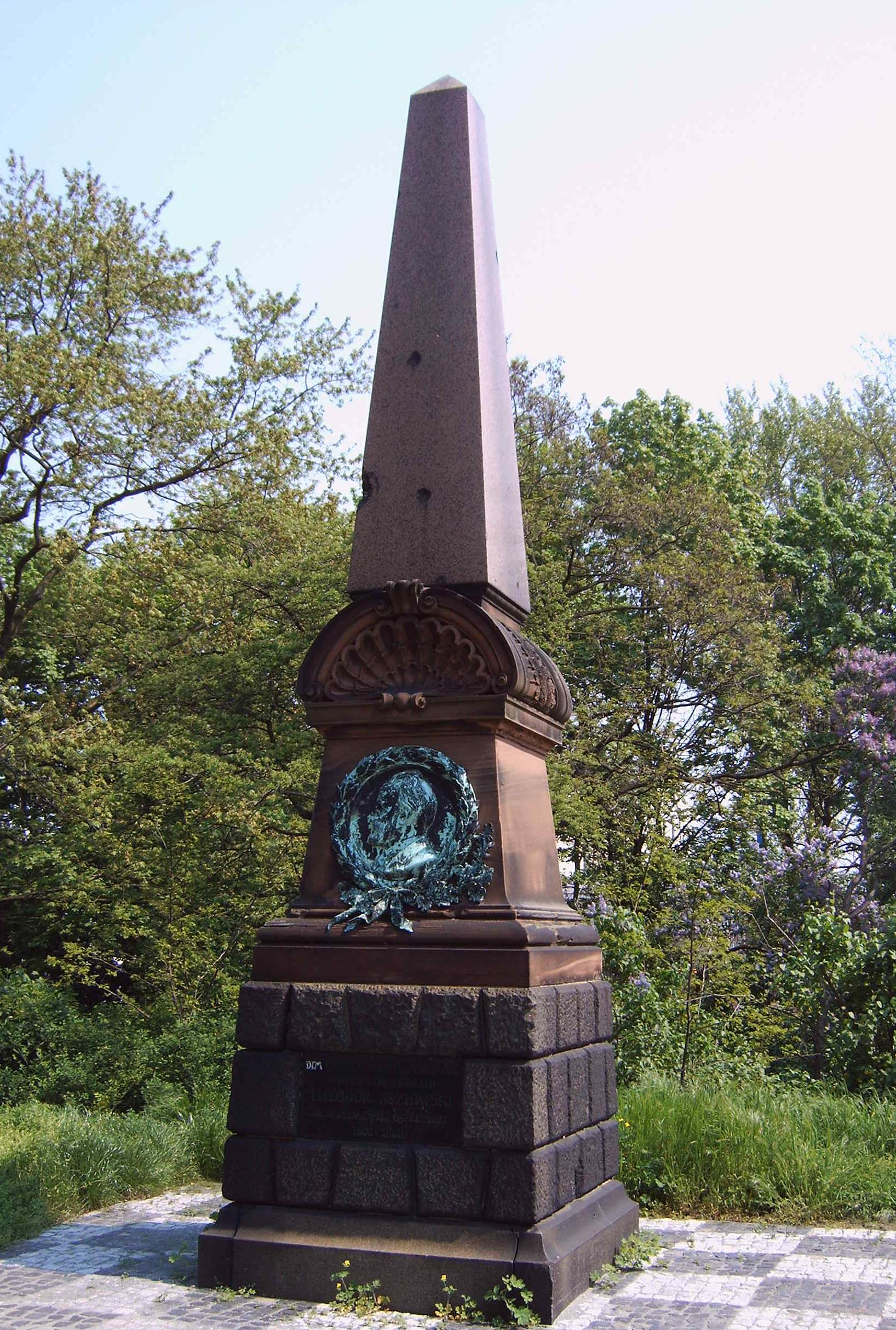 Kozlowski-Denkmal in Magdeburg, Sachsen-Anhalt, Deutschland